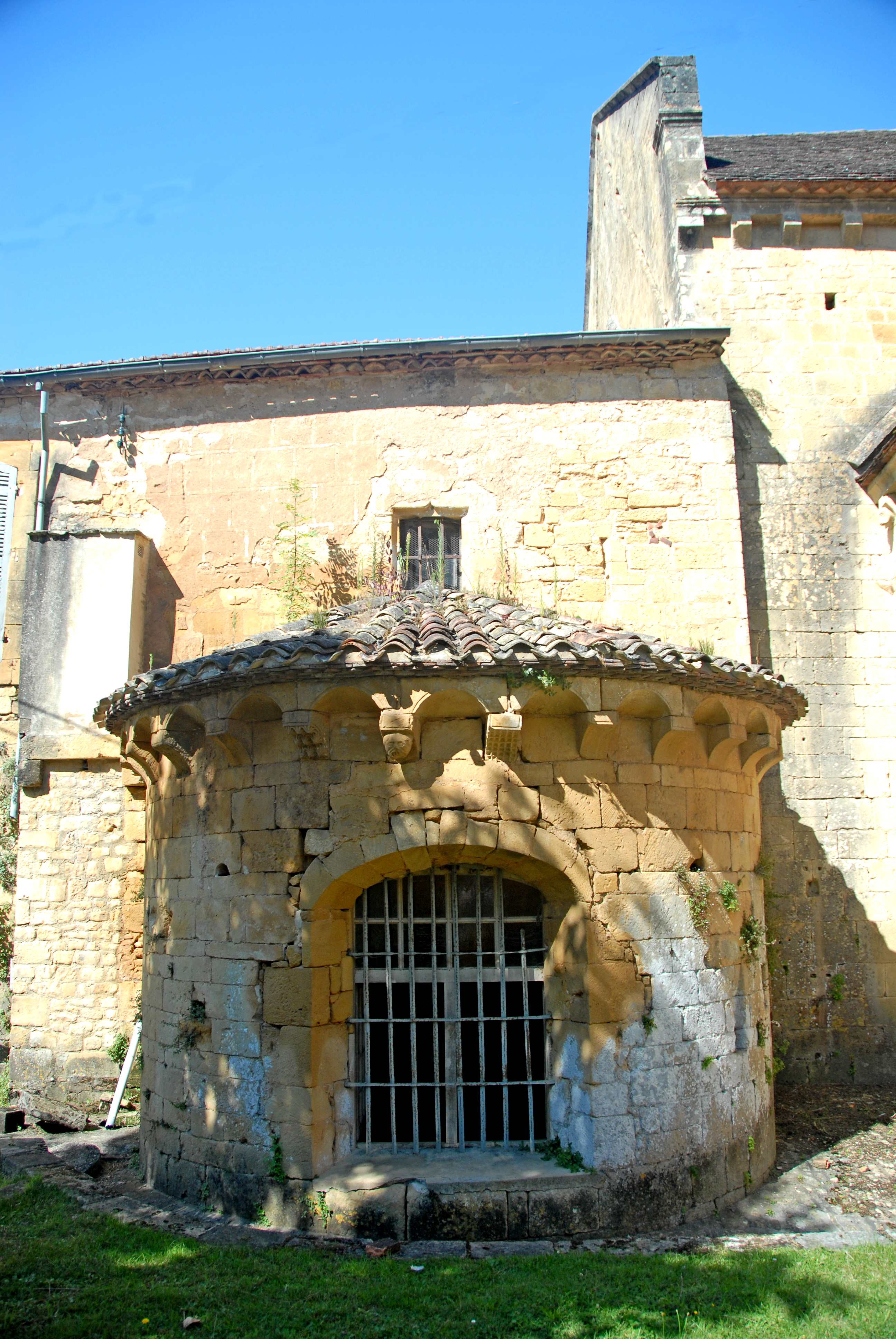 Cadouin, Apsis der Sakristei